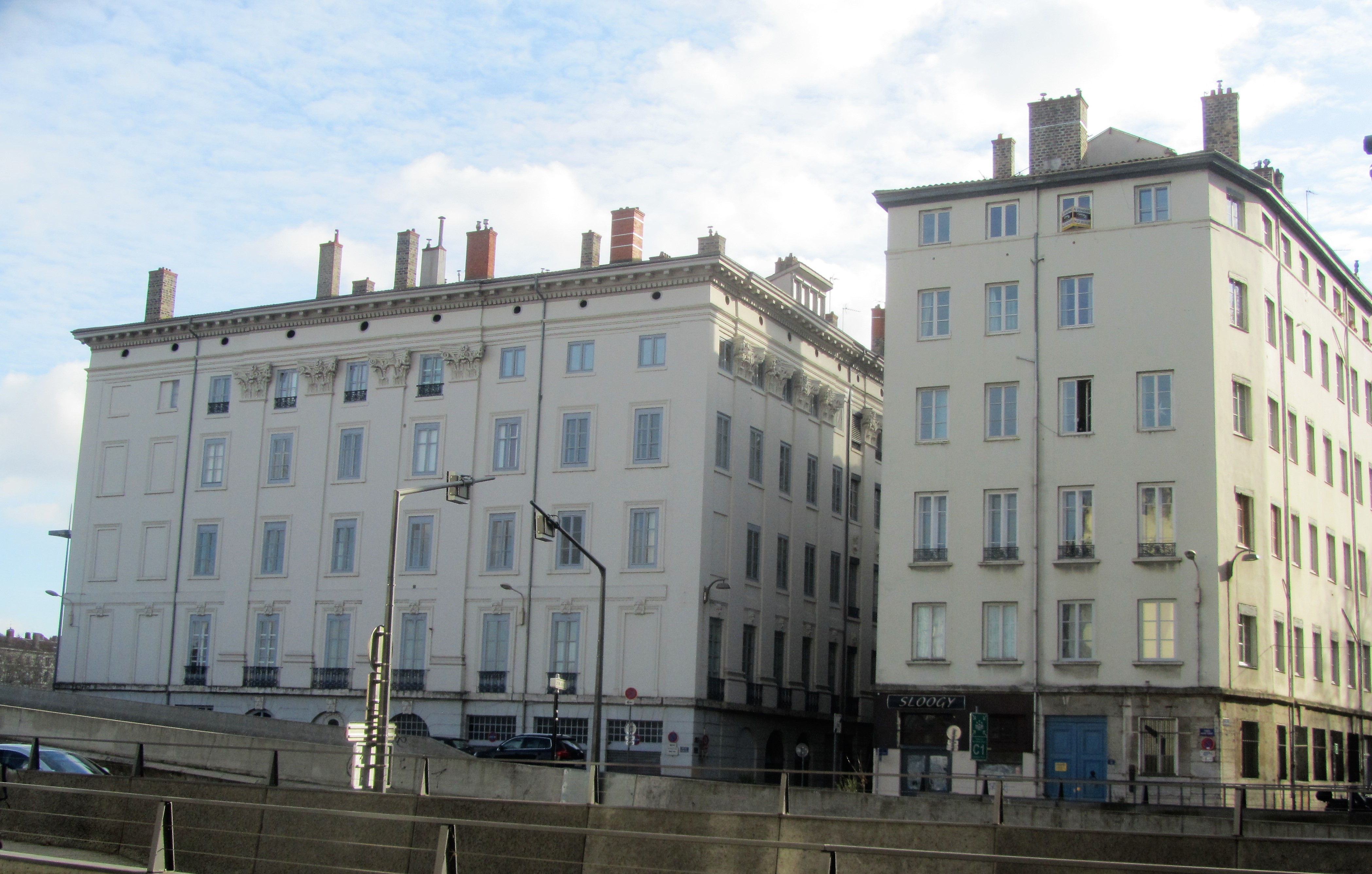 Rentabilisation maximale de l'espace urbain (rues étroites, plusieurs étages)